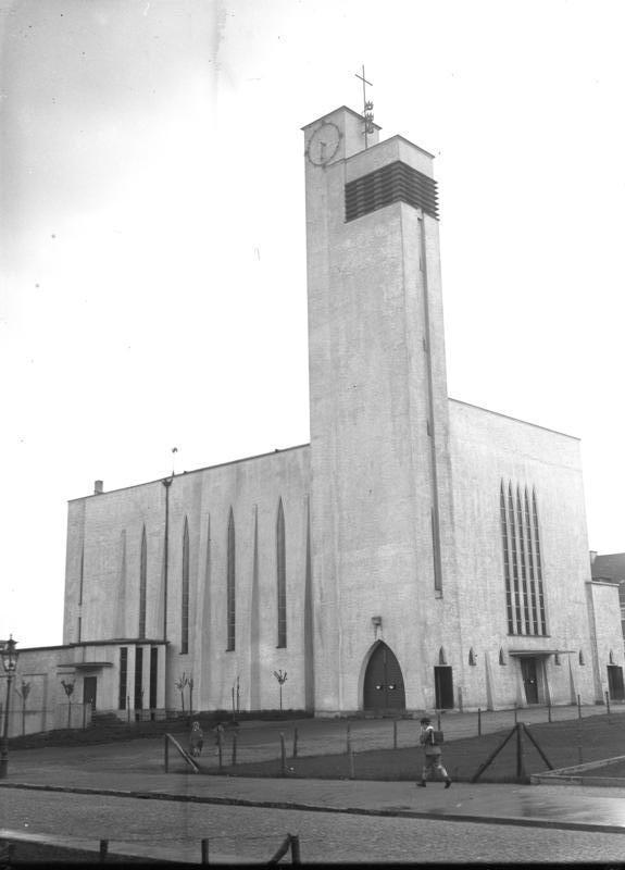 Ein moderner Kirchenbau in Biggendorf b/Köln a/Rhein! Dieser moderne Kirchenbau wurde in Biggendorf bei Köln am Rhein soeben vollendet.